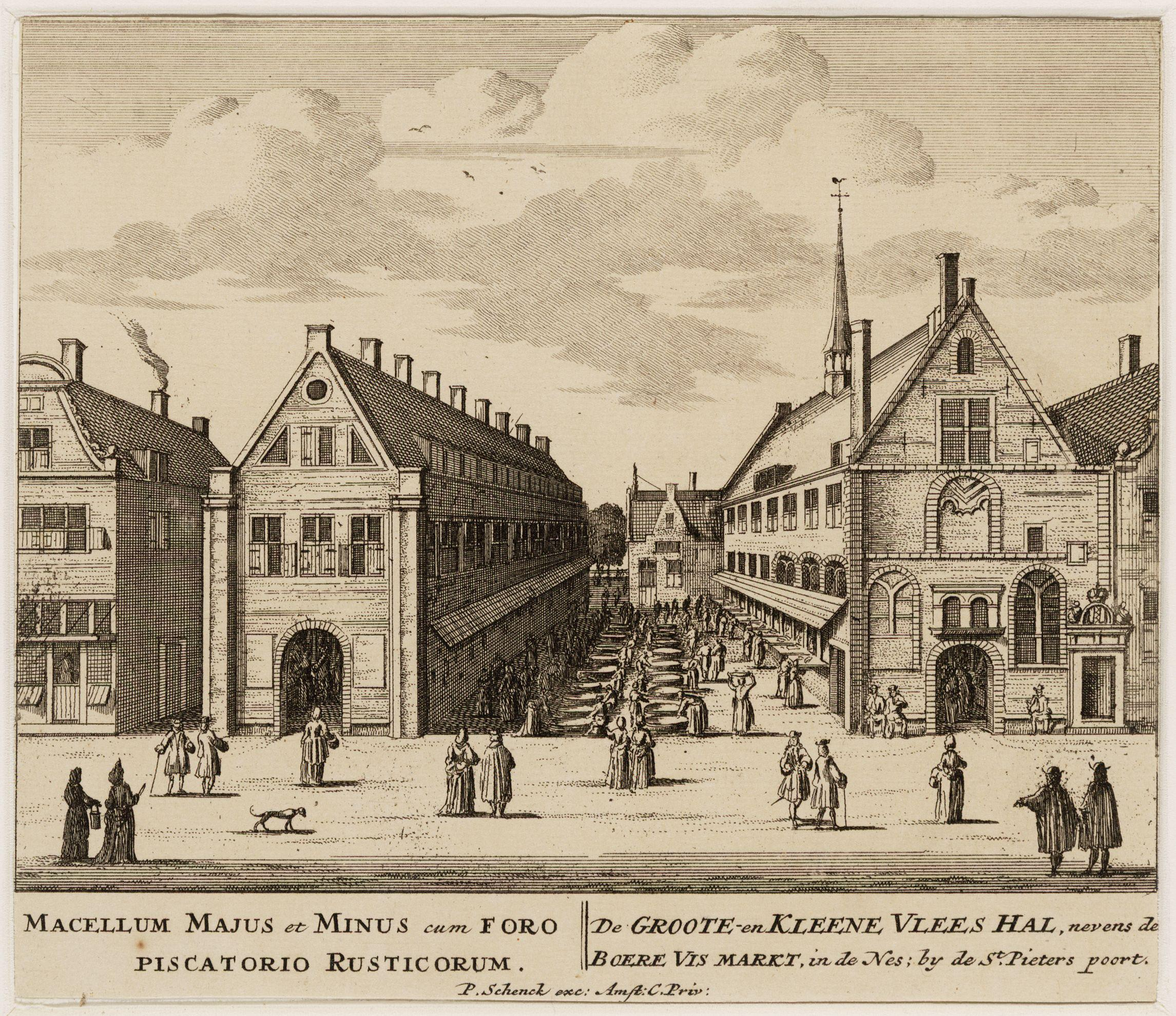 De Grote en Kleine Vleeshal. engraving. Amsterdam, Stadsarchief Amsterdam, collectie tekeningen en prenten.